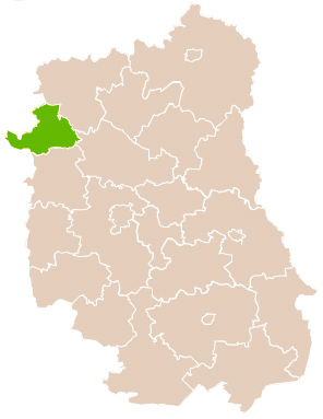 Map of Ryki county, Lublin voivodship Mapa powiatu ryckiego, województwo lubelskie